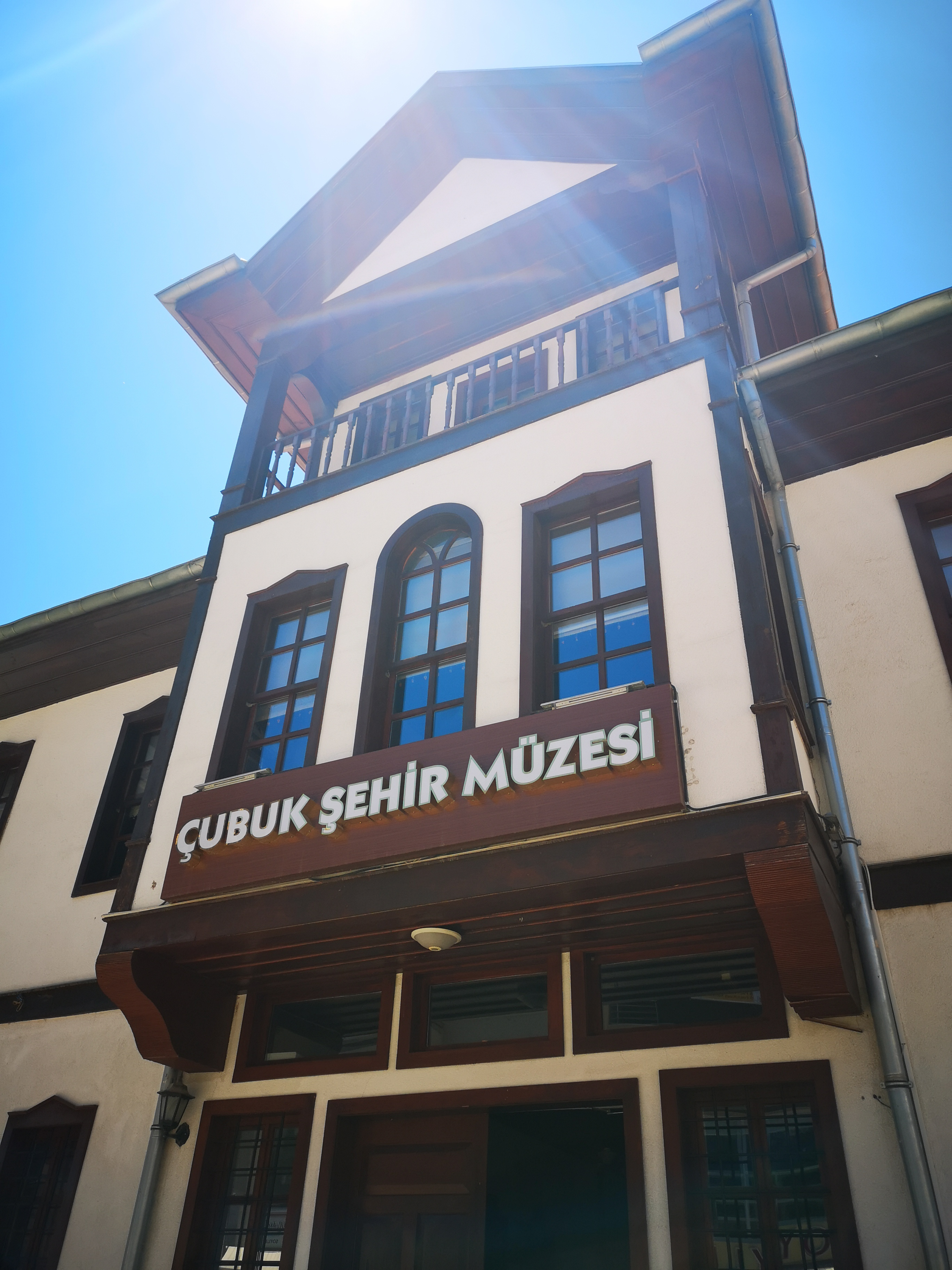 Ankara Çubuk'ta bulunan Çubuk Şehir Müzesi'nin bahçesinde sergilenen arkeolojik eserler ve müze binası.